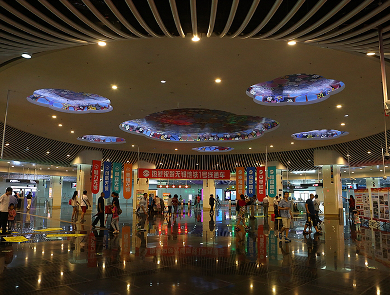 市民中心站大厅层